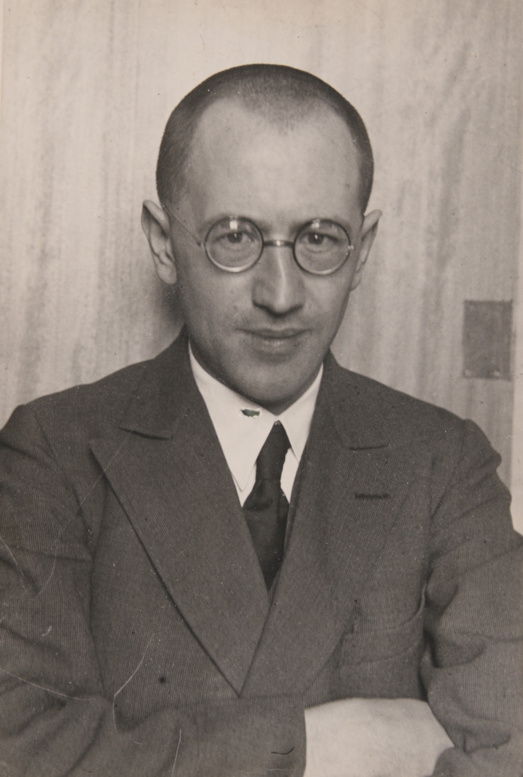 Dr. Gerhard Aßfahl in jungen Jahren